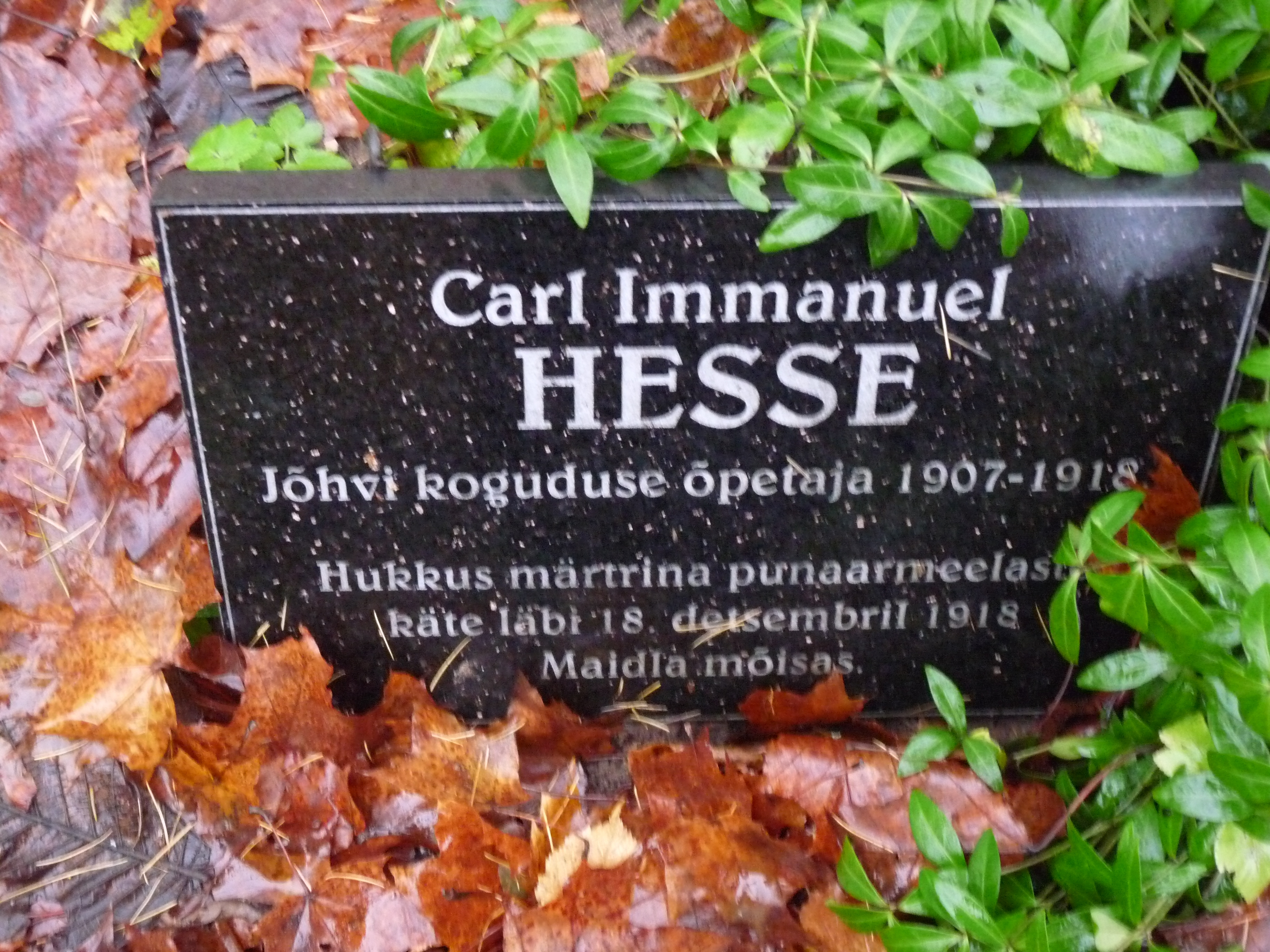 Carl Immanuel Hesse hauaplaat Jõhvi surnuaial, 4. november 2012